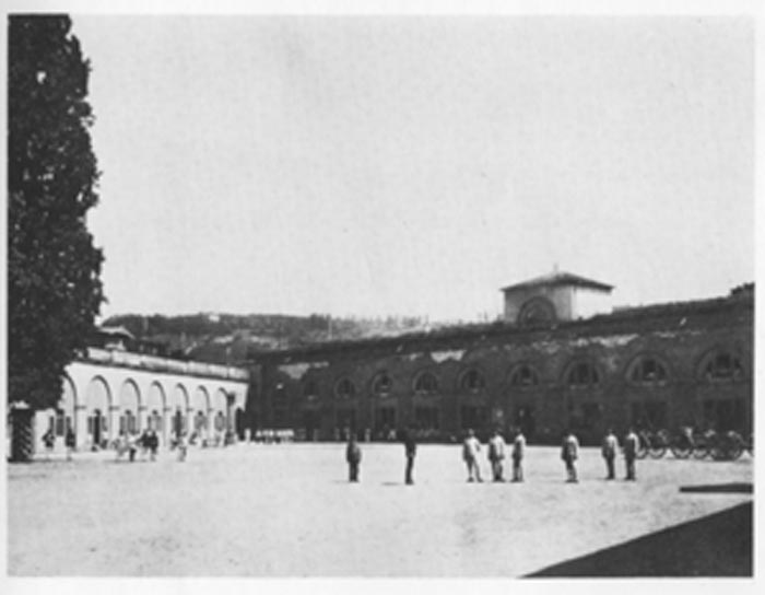 Innenhof der Rheinanschlußkaserne in Koblenz